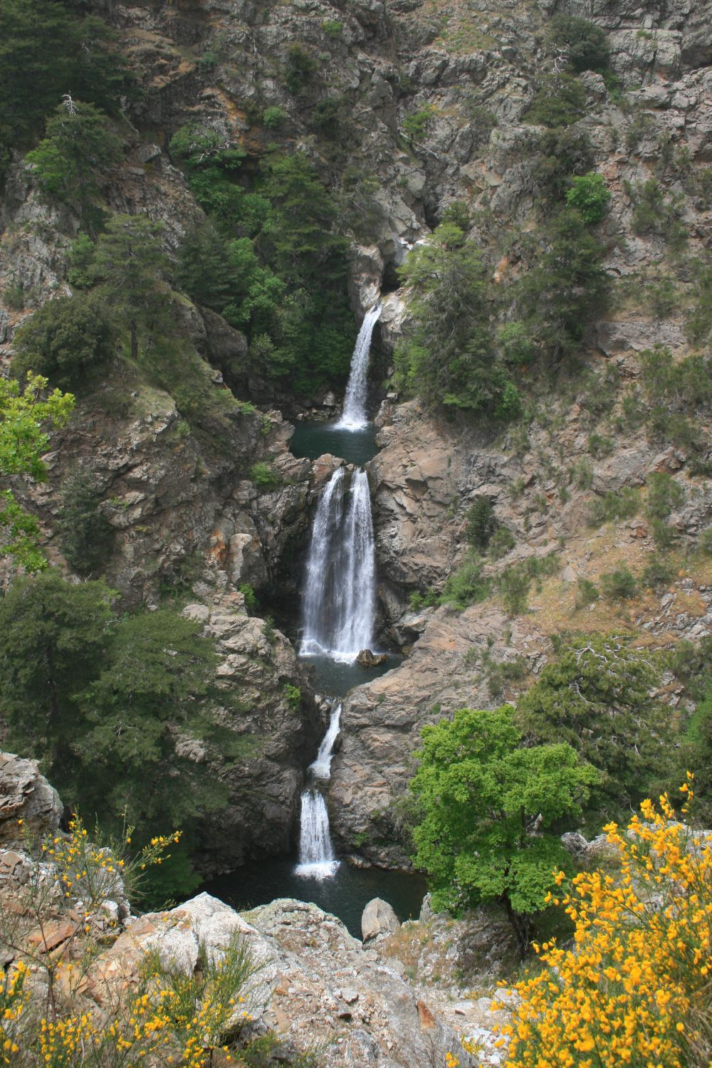 Italien/Italia/Italy: Kalabrien/Calabria, Prov. Reggio di Calabria, Parco Nazionale dell'Aspromonte, Cascate di Maesano